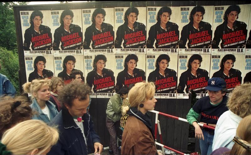 Juni 1988 Berlin (West), Junge Leute warten auf den Einlaß zum Michael Jackson Konzert vor dem Reichstag.